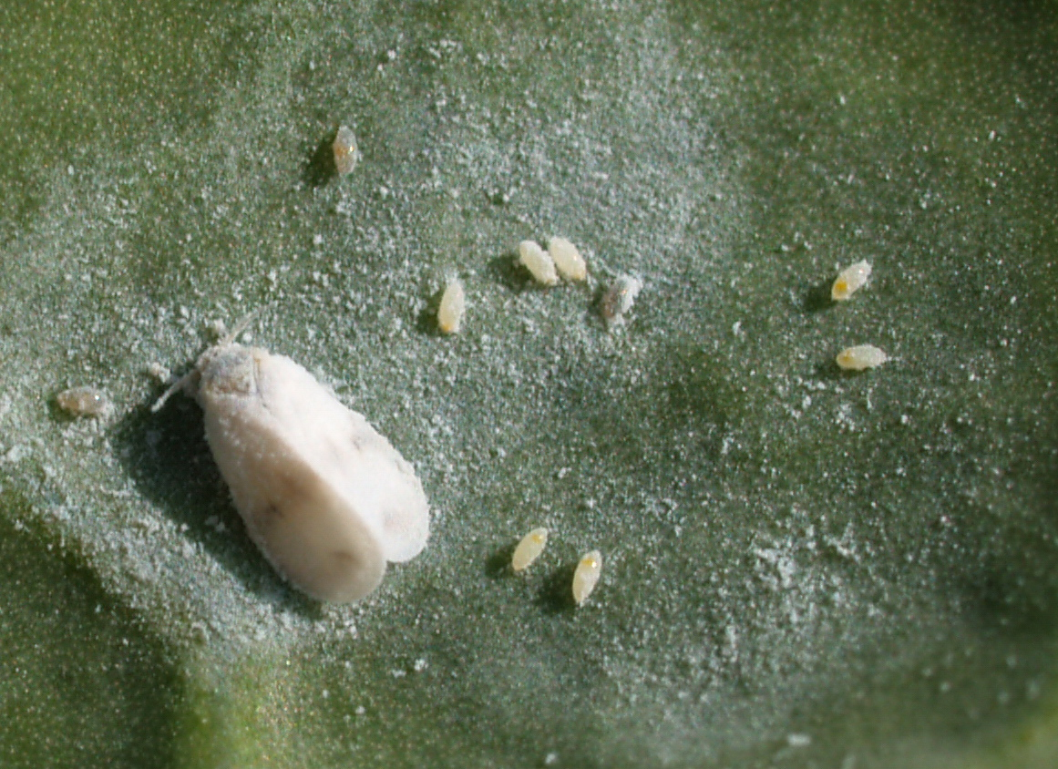 Adulto y huevos de Aleyrodes proletella en hoja de col.